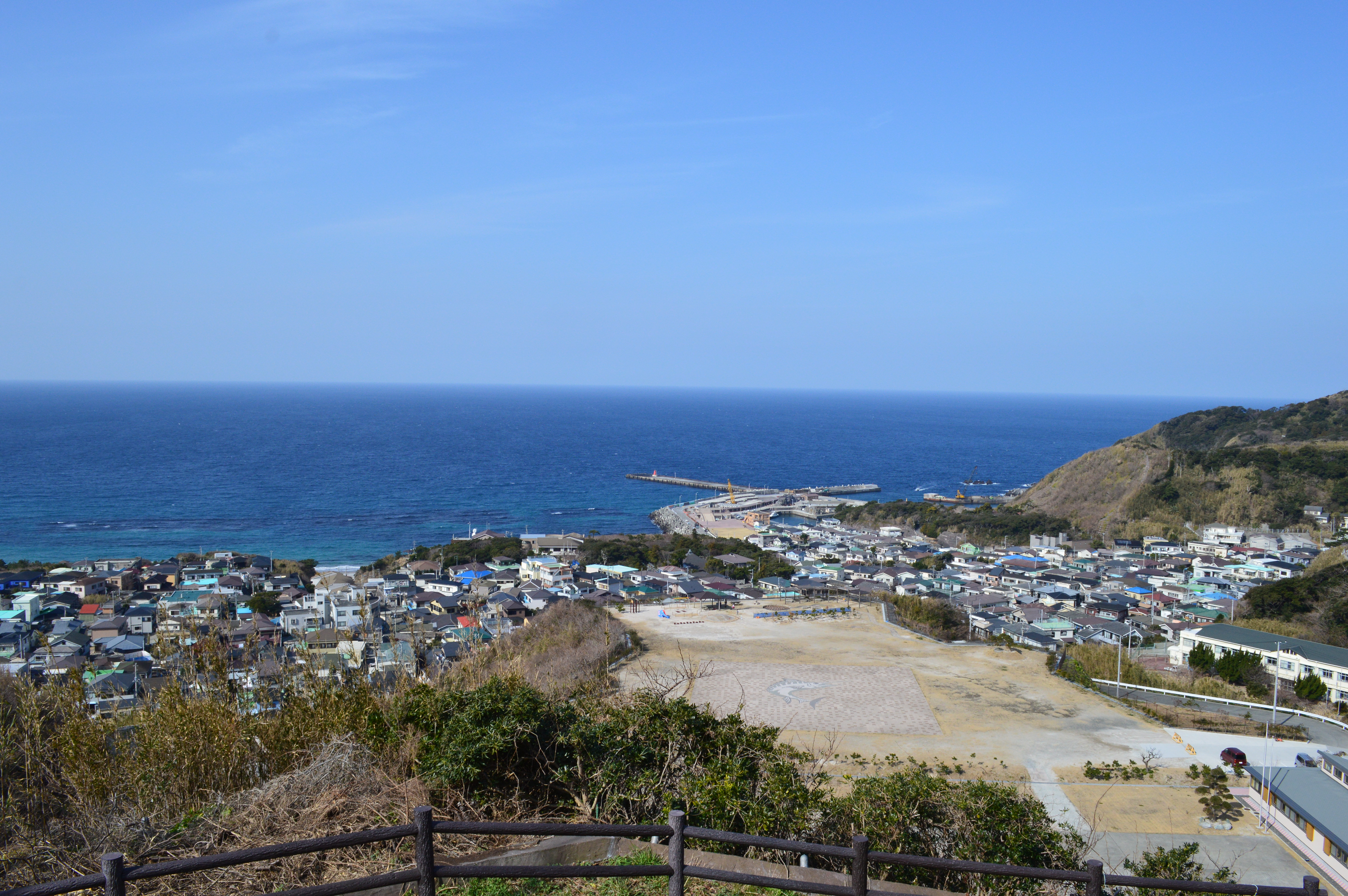 神津島村前浜集落